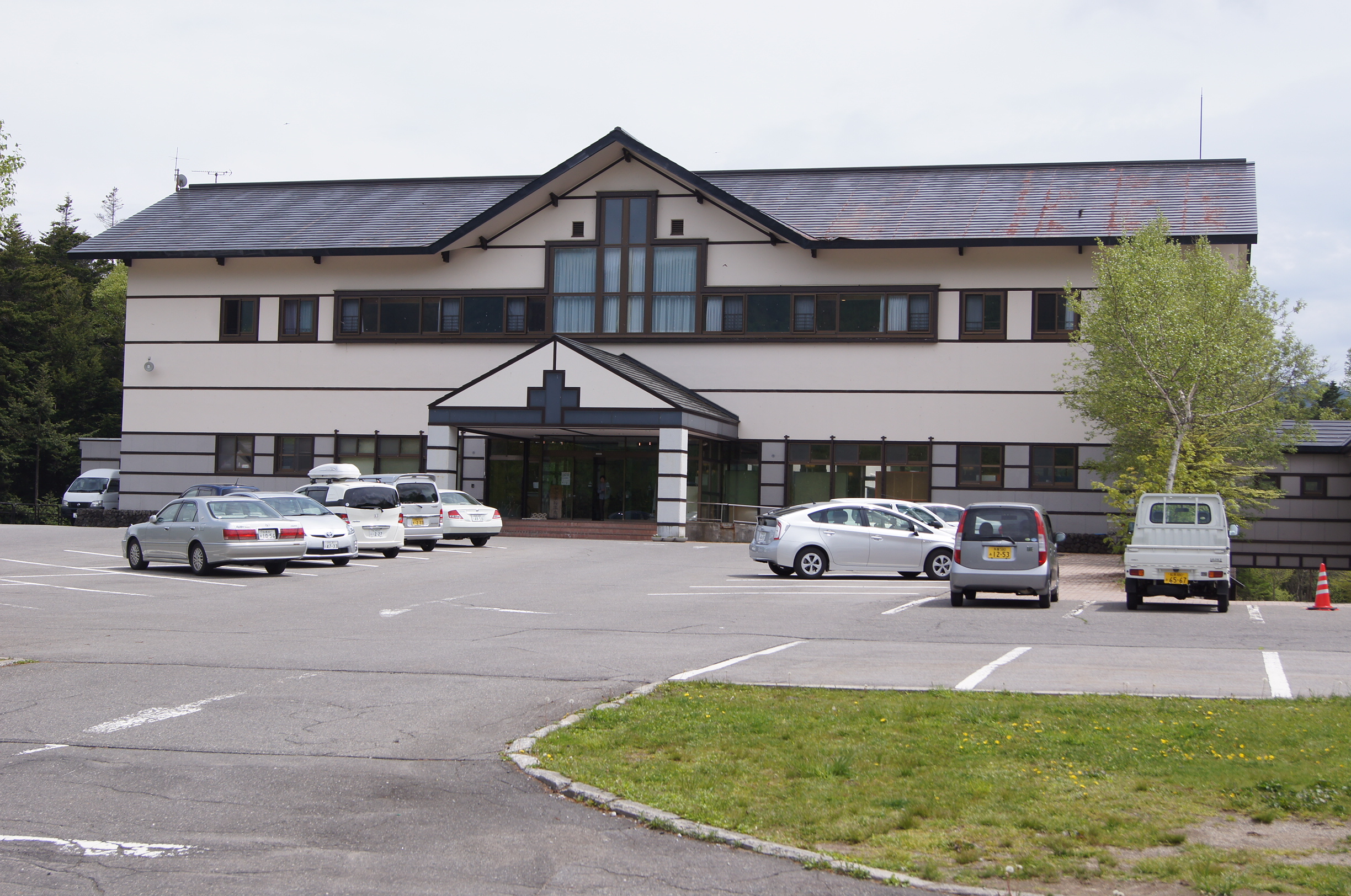 長野県松本市安曇の乗鞍高原にある「休暇村乗鞍」の本館前景